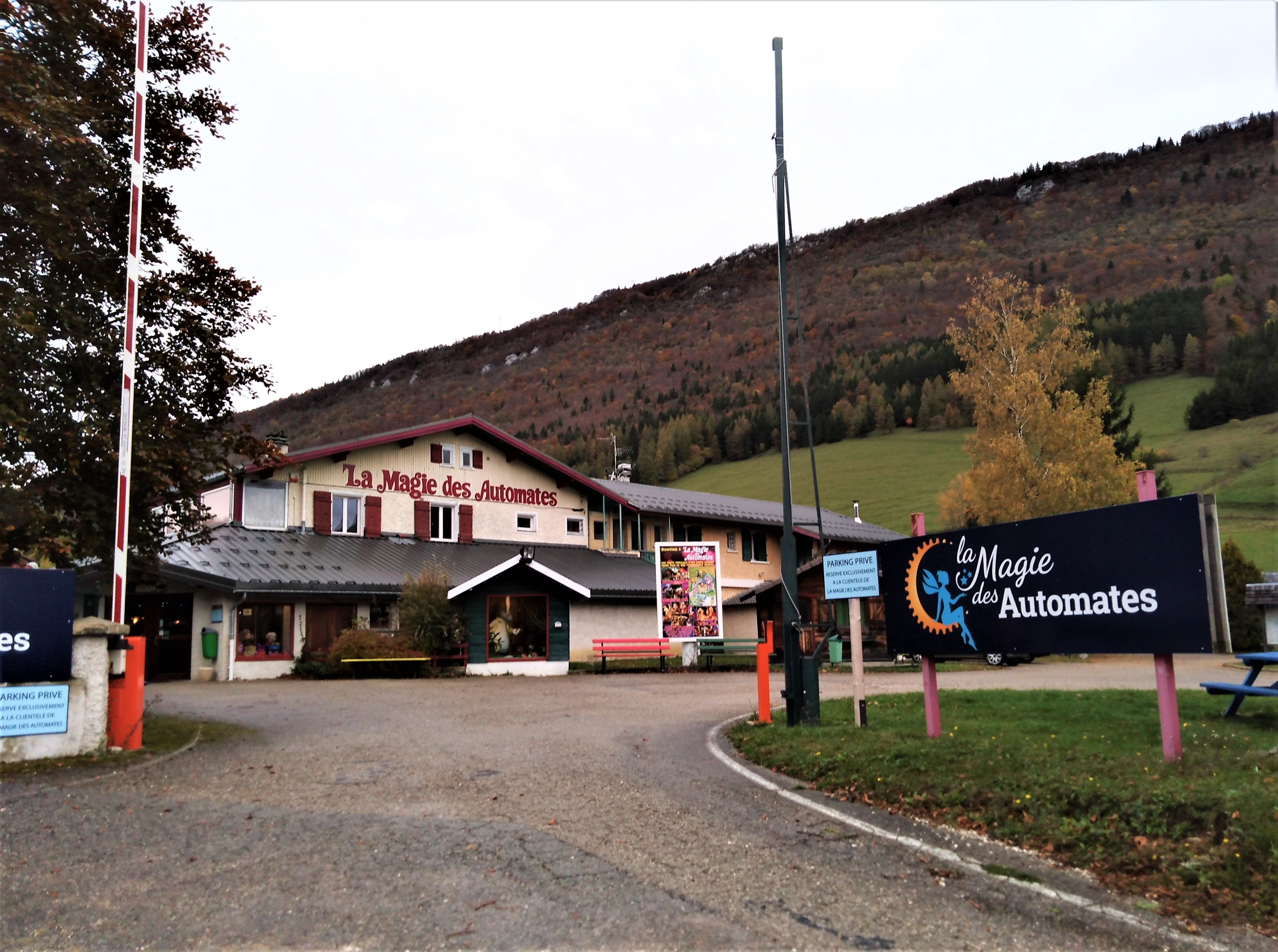 Magie des automates en novembre 2019